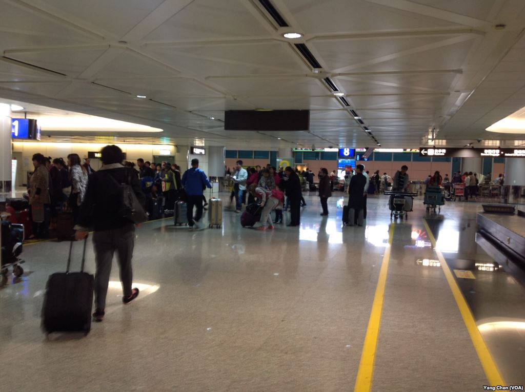 臺灣桃園國際機場因為H7N9疫情而加強機場檢驗。